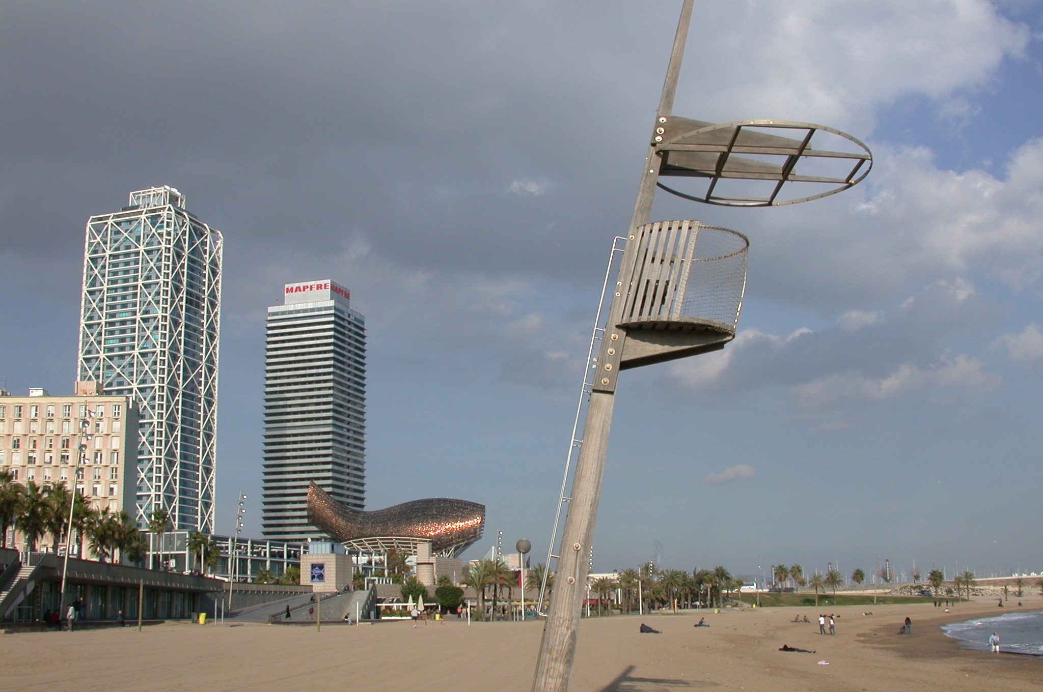 La platja de la Barceloneta i les torres bessones, Barcelona, Catalunya.